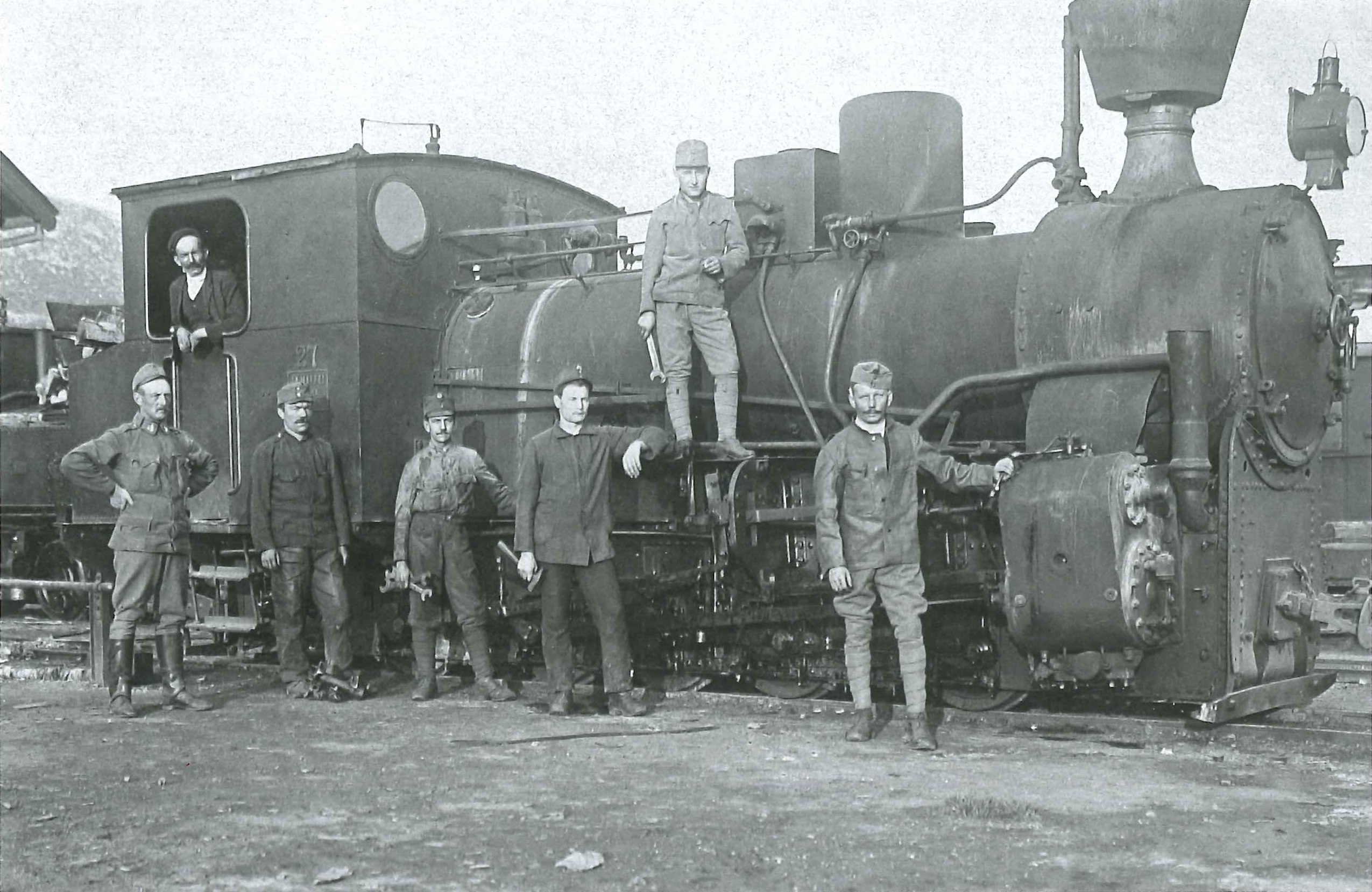 E-Lokomotive der Steinbeisbahn aus dem Jahr 1915 vor dem Heizhaus Drvar. Neben dem Lokomotivführer und dem zivilen Werkstättepersonal ist in der Mitte ein Unteroffizier und rechts ein Soldat zu sehen.